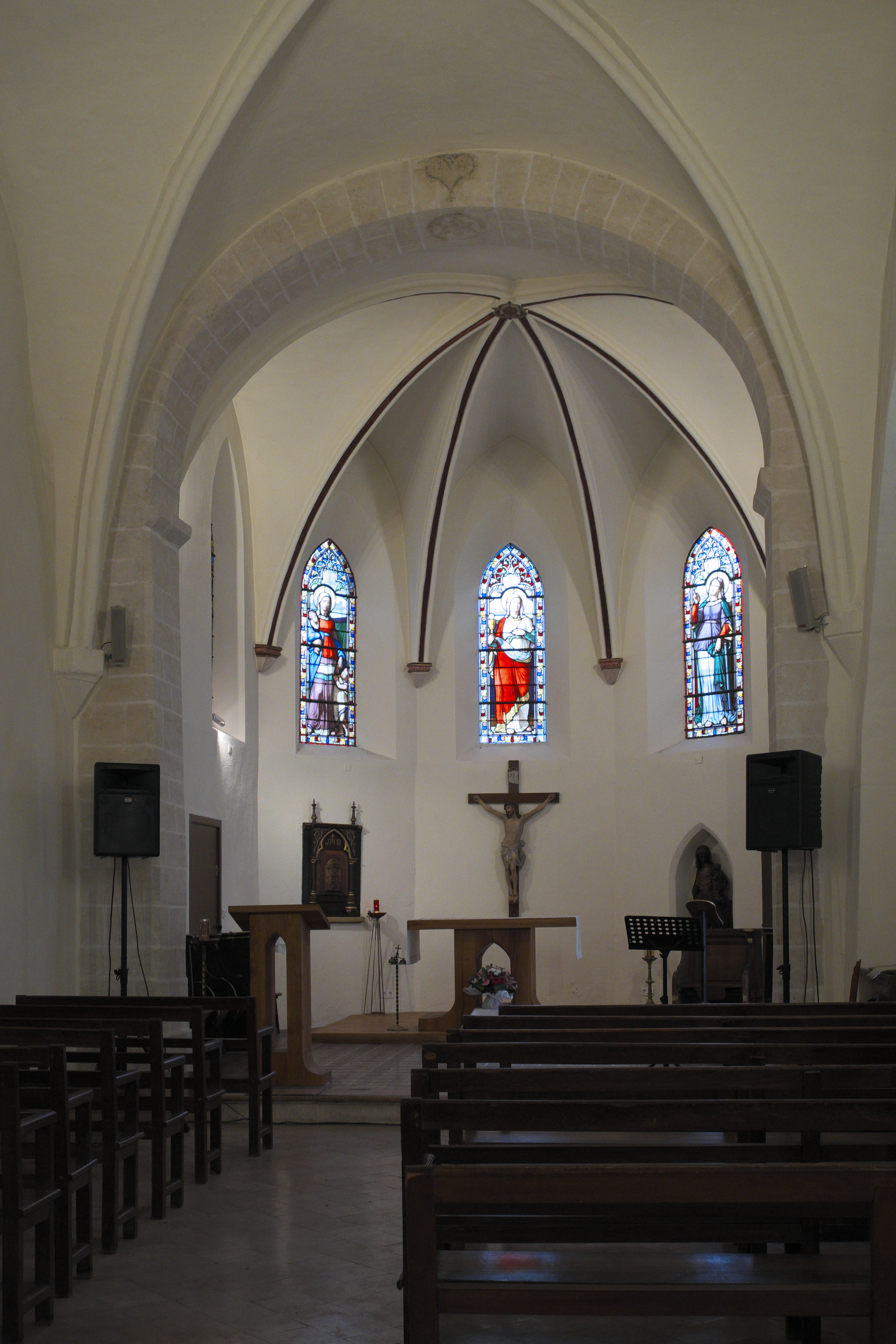 Katholische Kirche Saint-Pierre in Boussy-Saint-Antoine im Département Essonne (Île-de-France/Frankreich), Innenraum